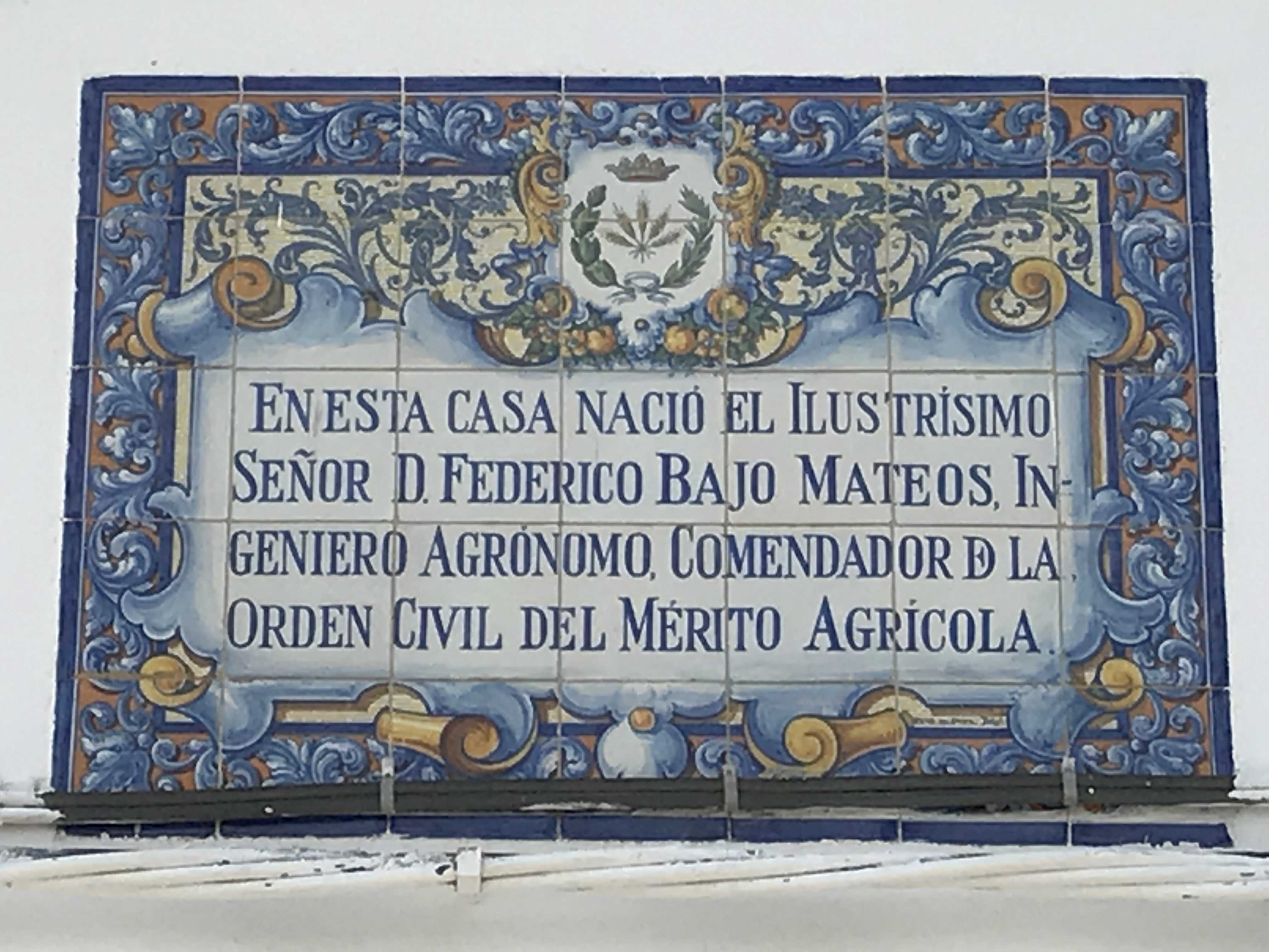 Homenaje a Federico Bajo Mateos en su casa de nacimiento en La Calzada de Oropesa